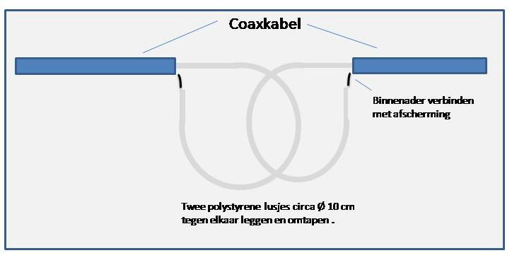 "Simpele mantelstroom transformator van coaxkabel voor VHF/UHF signalen"